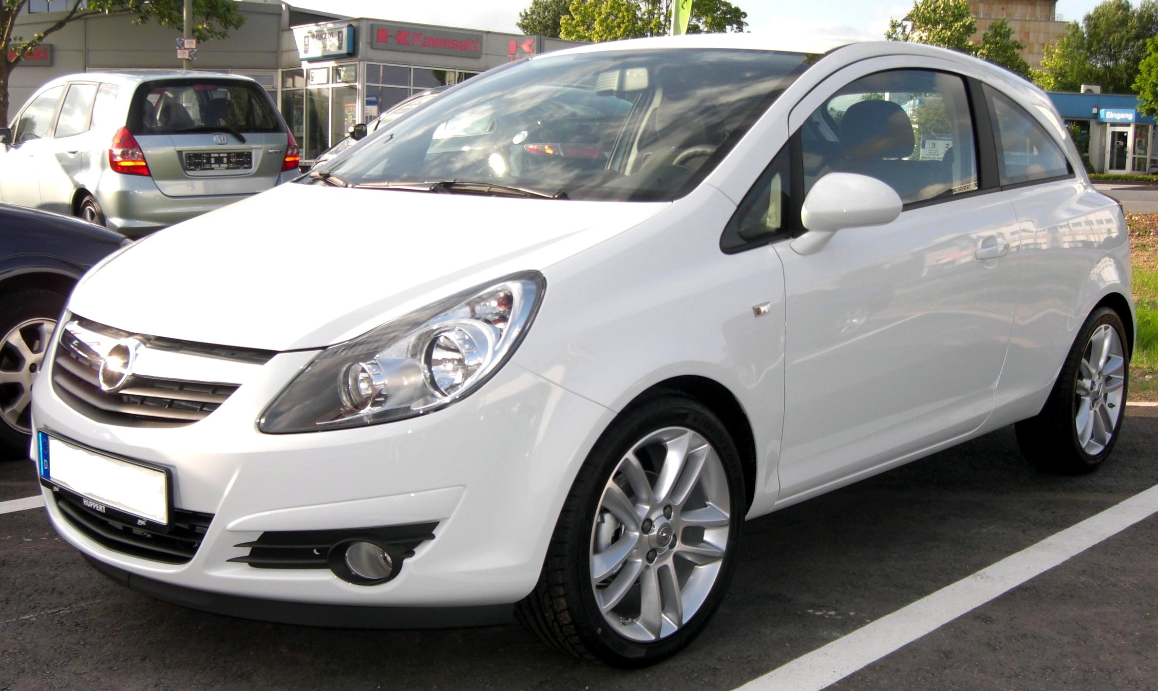 Opel Corsa D